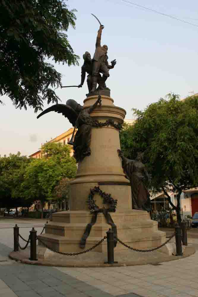 Monumento a Vara de Rey, Ibiza. Obra d'Eduard Alentorn